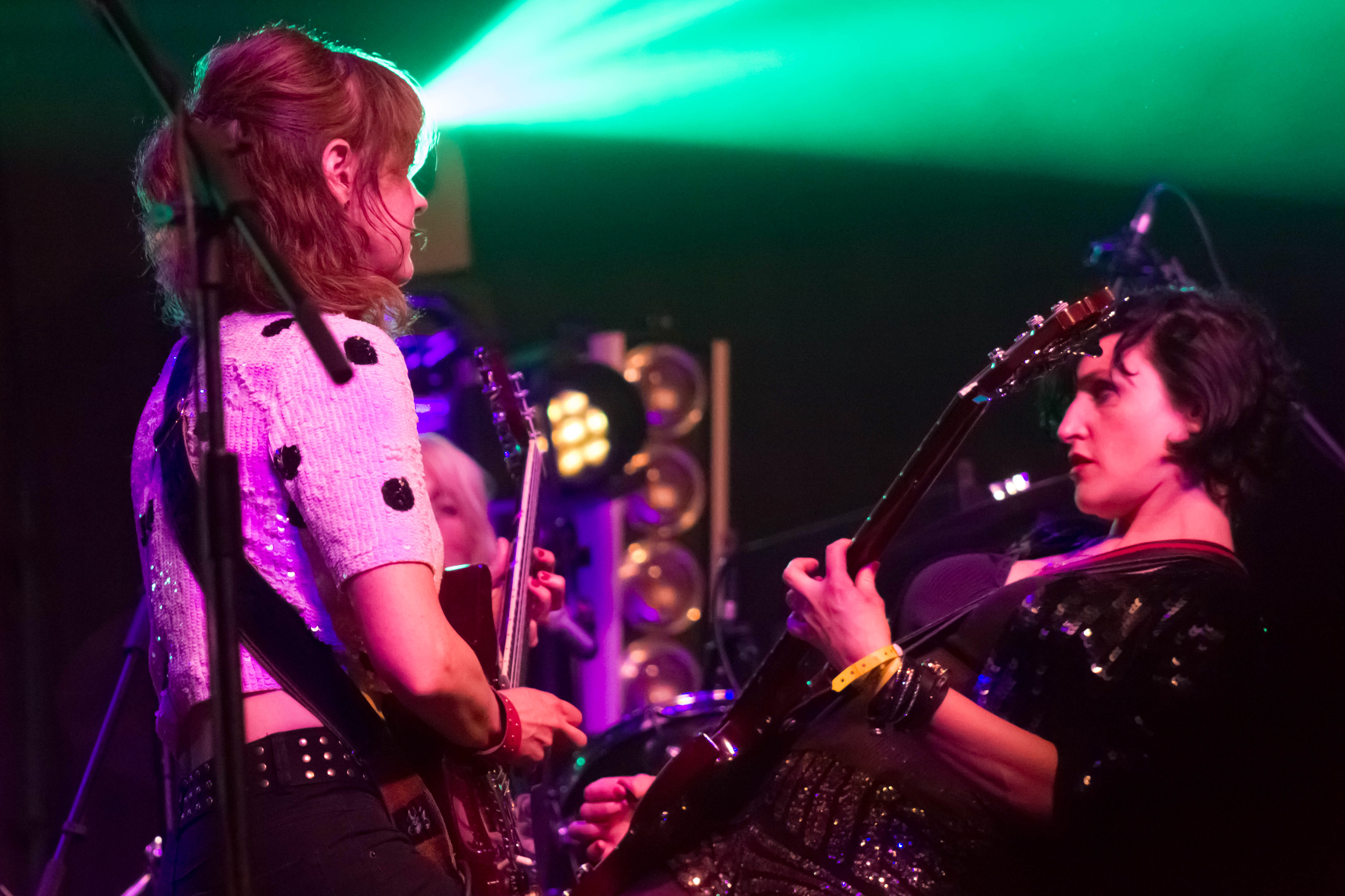 A banda estadounidense Ex Hex no NOS Primavera Sound 2015 de Porto.